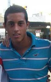 Rogelio Funes Mori a la salida de un entrenamiento